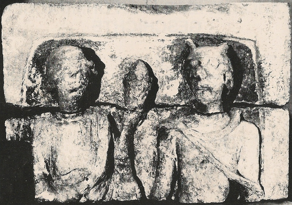 Heute im Museum in Speyer zu finden.